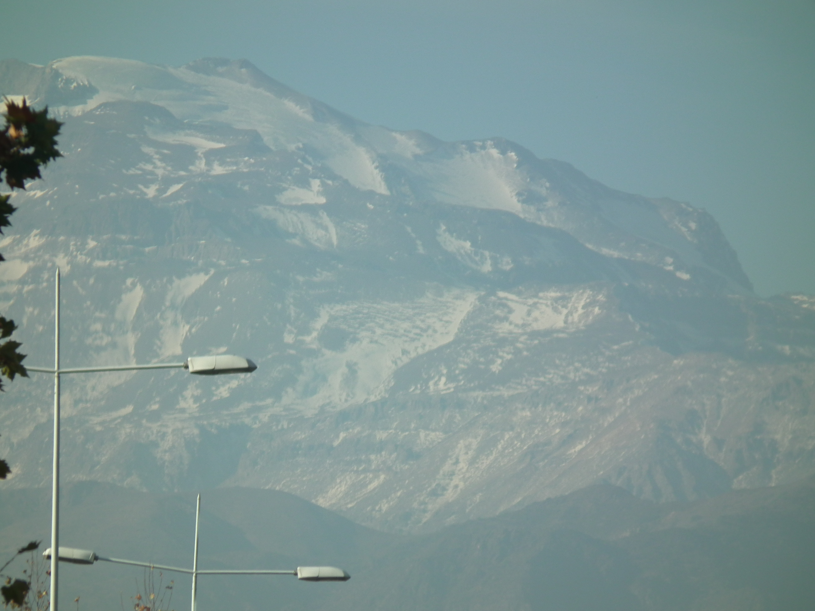 El cerro El Plomo es una montaña ubicada en la Región Metropolitana de Santiago, en el centro de Chile. Con una altitud de 5.424 metros sobre el nivel del mar, es el punto más alto visible desde la ciudad de Santiago de Chile. Los Incas lo nombraron Apu es decir guardián del valle. Es una de las mayores metas de los andinistas de Santiago.